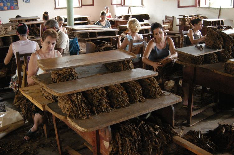 Cuba, september 2005, info in de Metadata